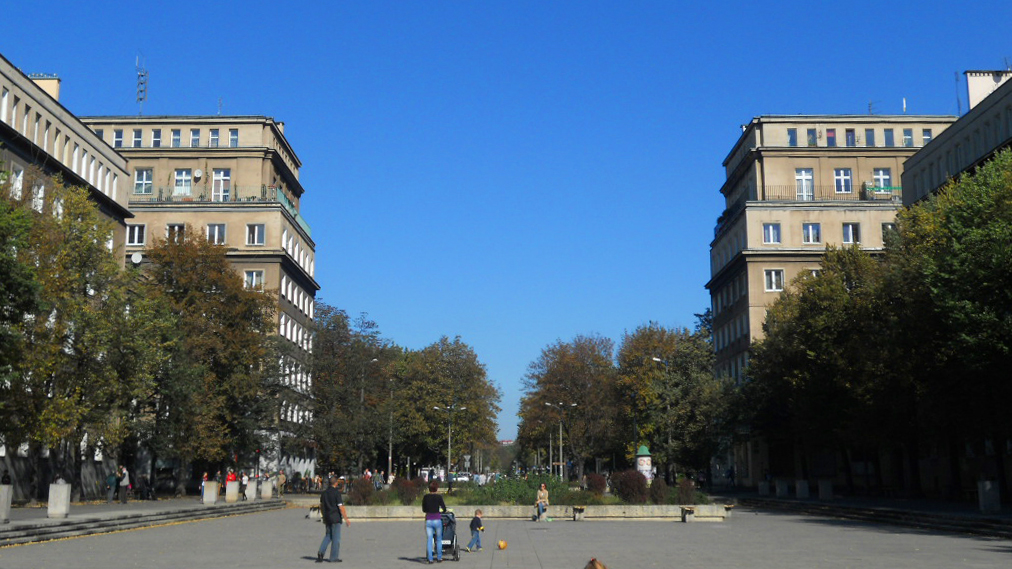 Widok ogólny odcinka Alei Róż od Placu Centralnego po Aleję Przyjaźni(Kraków).